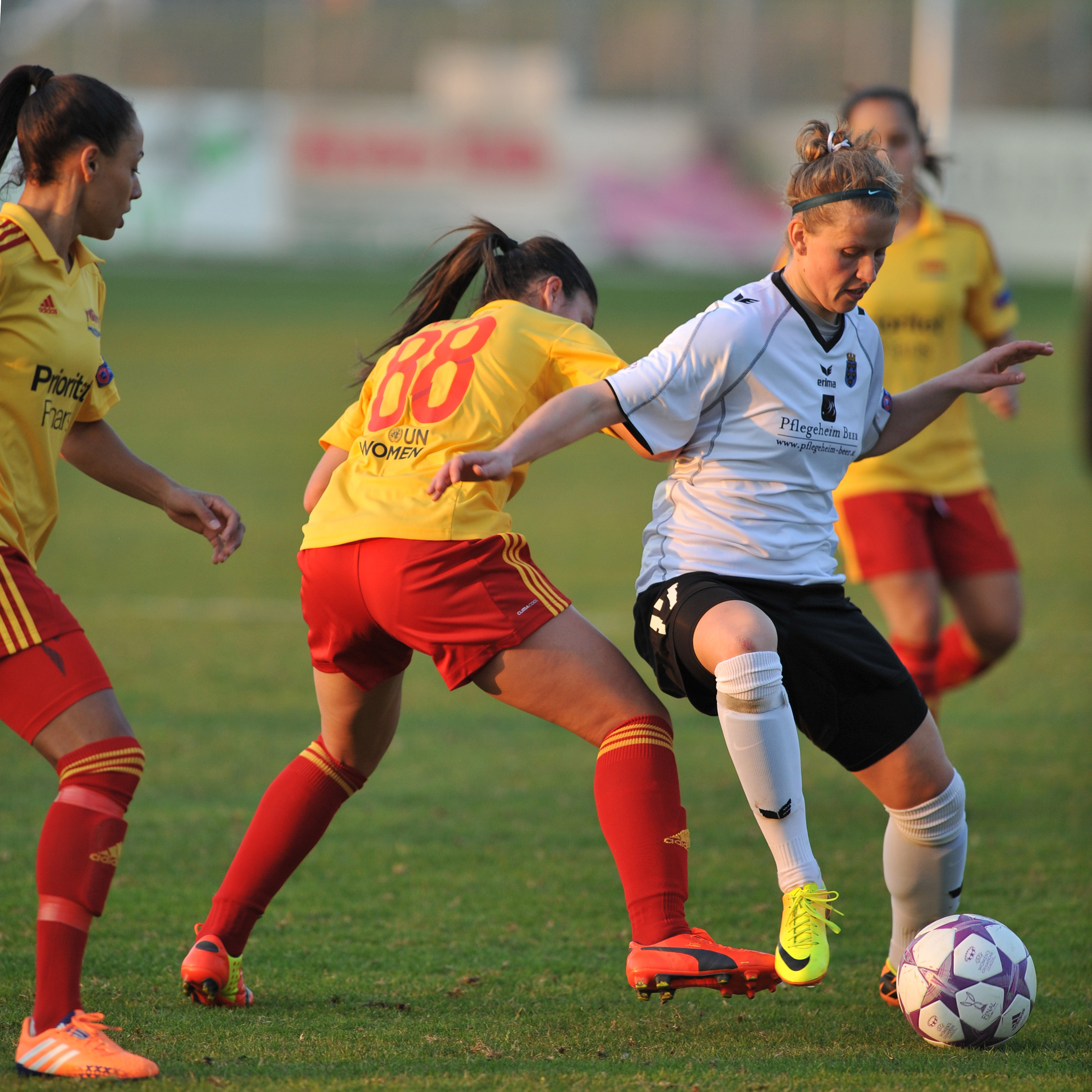 UEFA Women's Champions League 2013/14 SV Neulengbach - Tyresö FF Neulengbach, 29. März 2014 Jana Vojteková